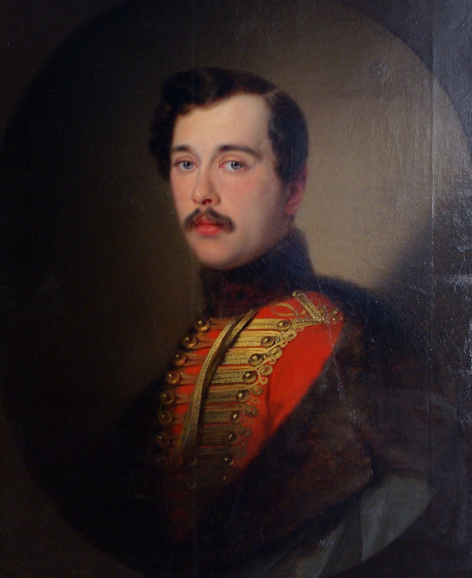 Иван Николаевич Новосильцев (1825—1870)